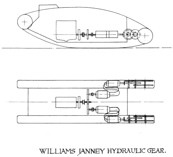 Digitale reproductie foto van de oorspronkelijke vergelijkingstekening voor het Williams-Janneytransmissieproject uit 1917